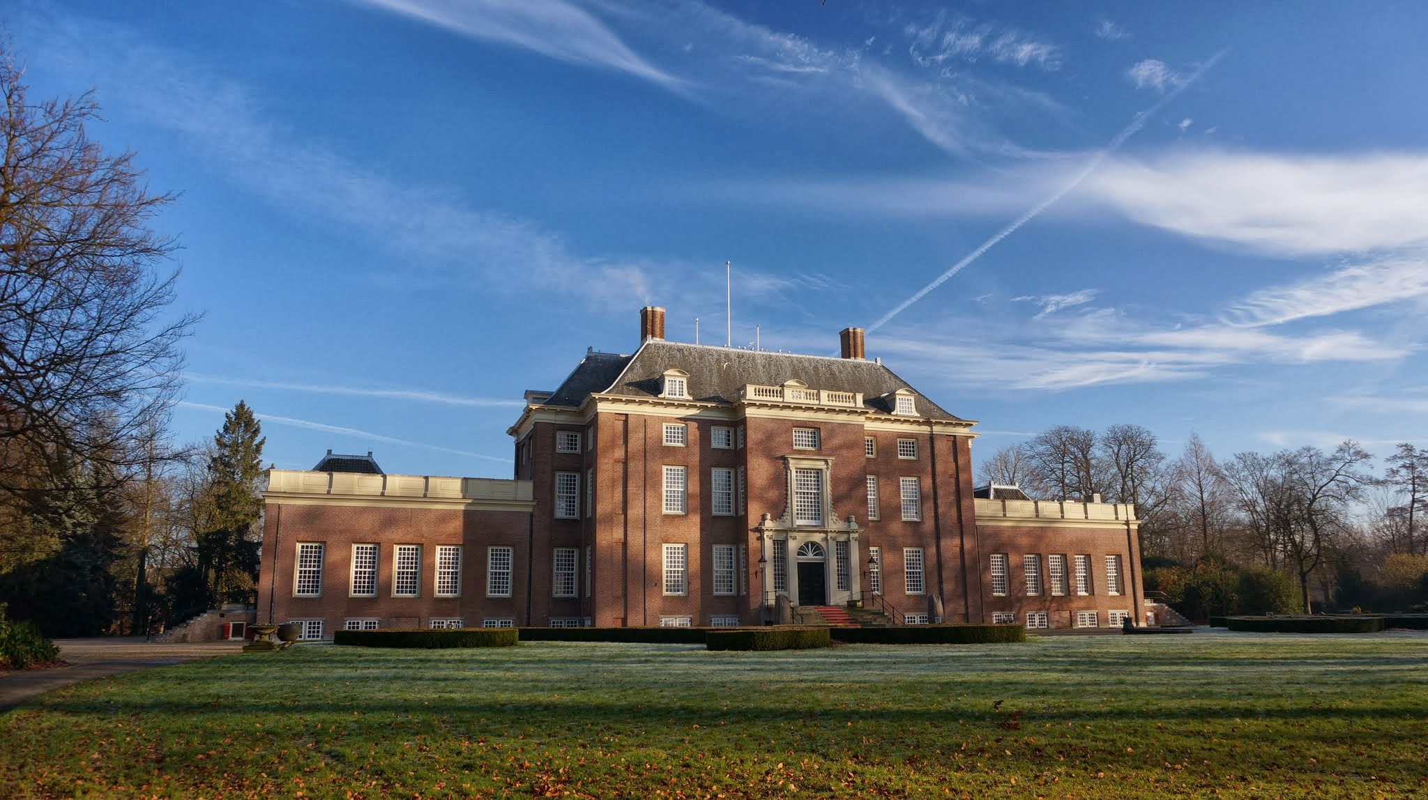 Het Slot en omgeving, 3703 Zeist, Netherlands